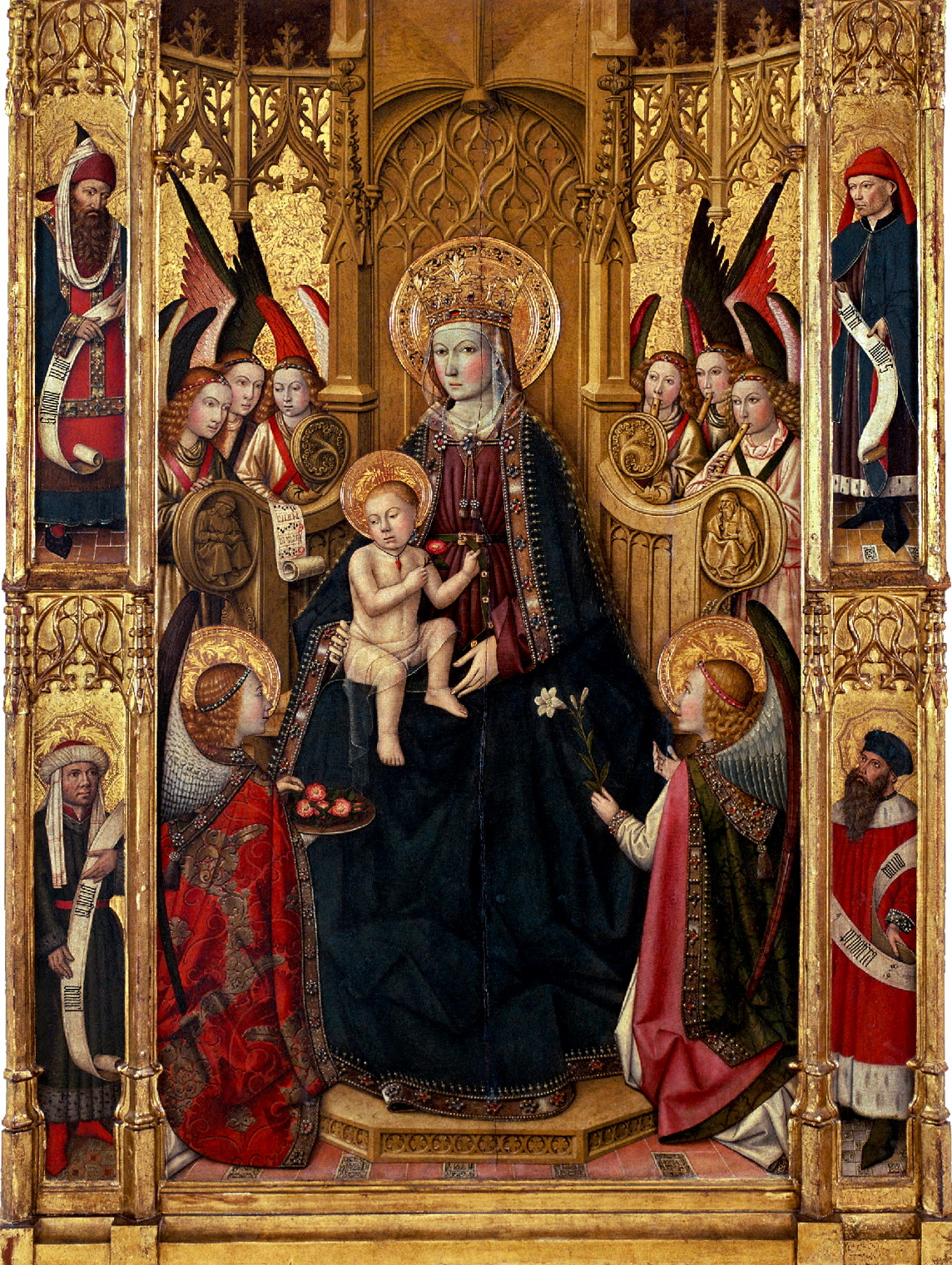 Taula central d'un retaule de la Mare de Déu. Al Museu Diocesà de Tarragona es conserva una altra taula del mateix retaule, amb l'Anunciació. Procedeix de l'antiga església parroquial de Vallmoll (Alt Camp).